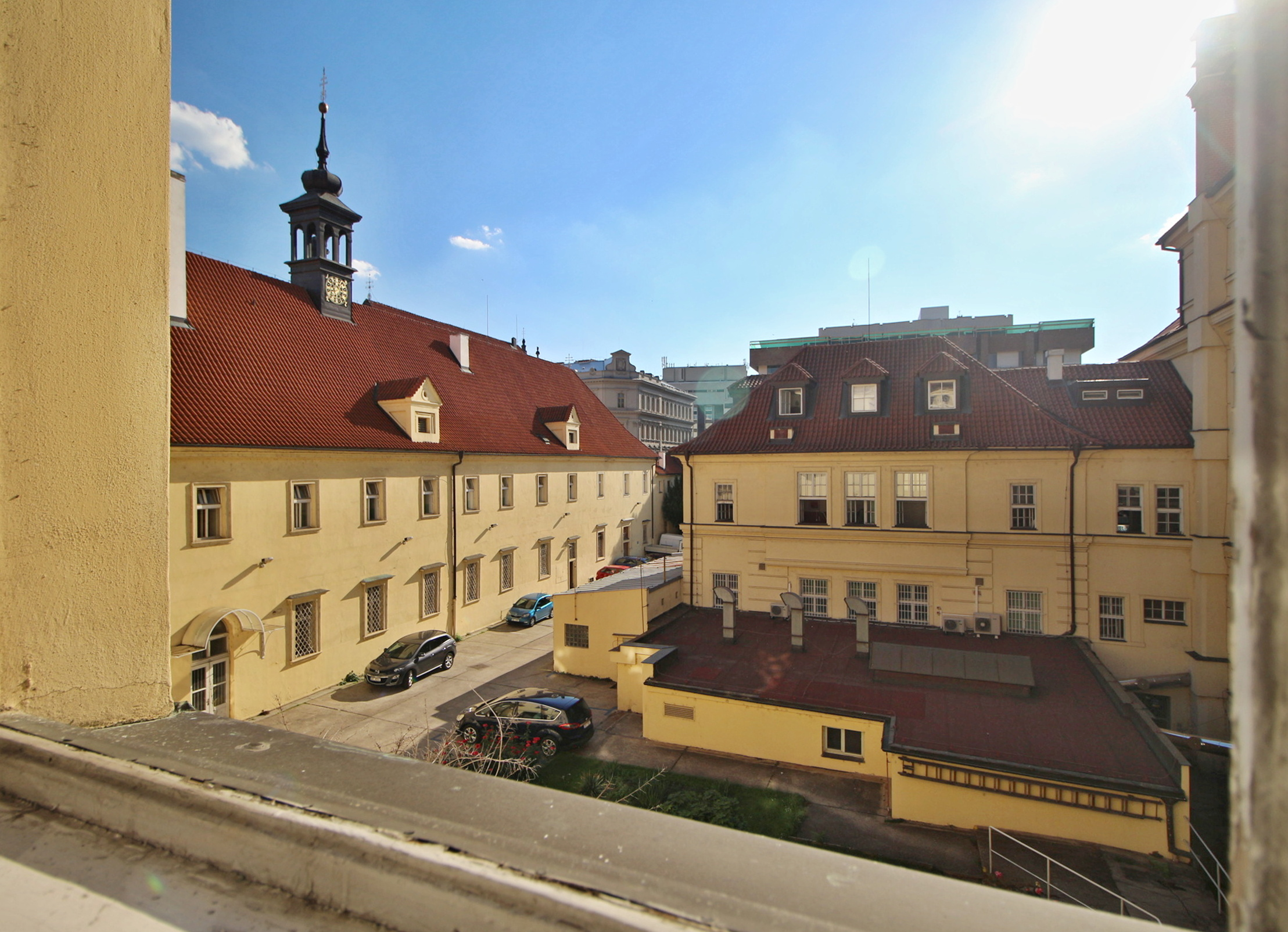 Klášter milosrdných bratří s kostelem svatých Šimona a Judy v Praze "Na Františsku"